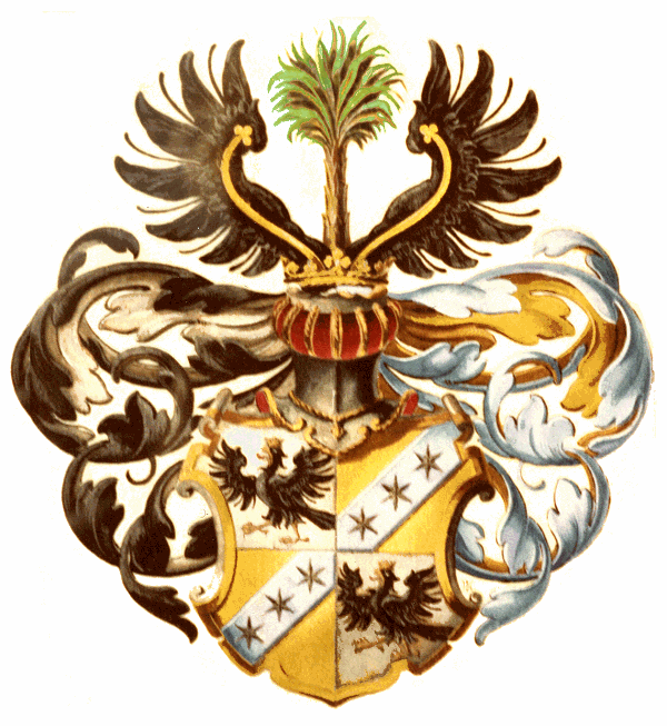 Wappen derer von Boehmer